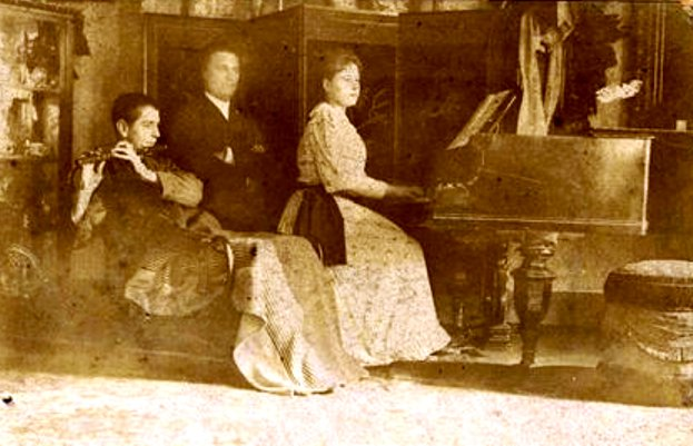 Náday Ferenc, és gyermekei Náday Béla és Náday Ilonka otthonukban